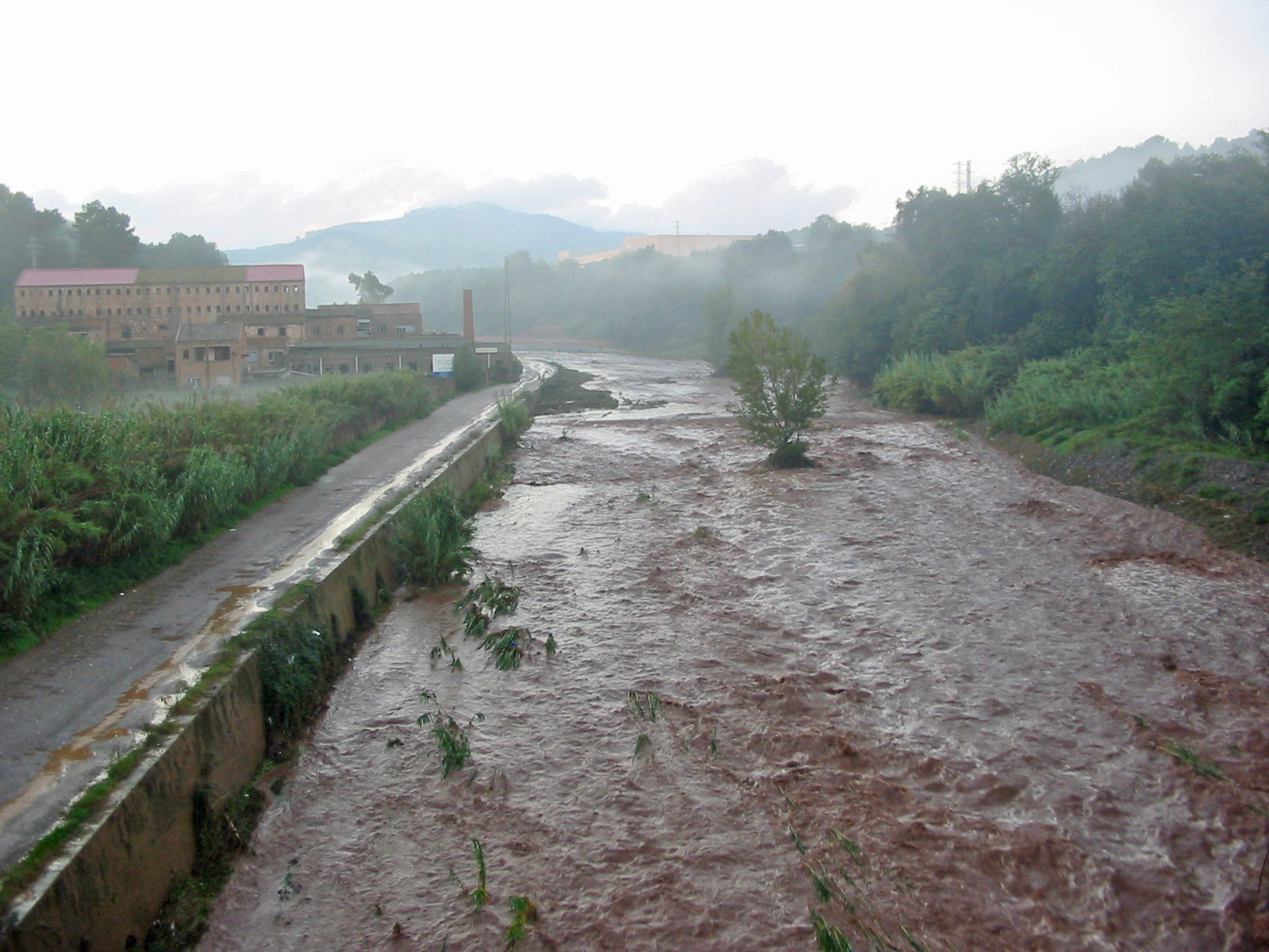 Río Ripoll a la altura de Sabadell después de lluvias torrenciales